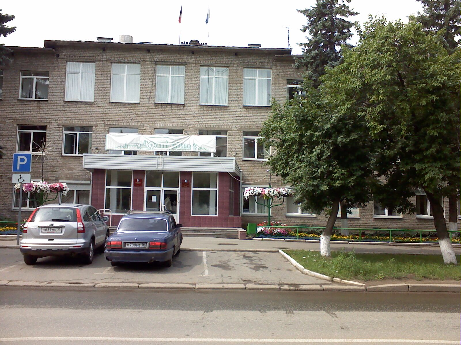 Администрация Индустриального района (Ижевск)